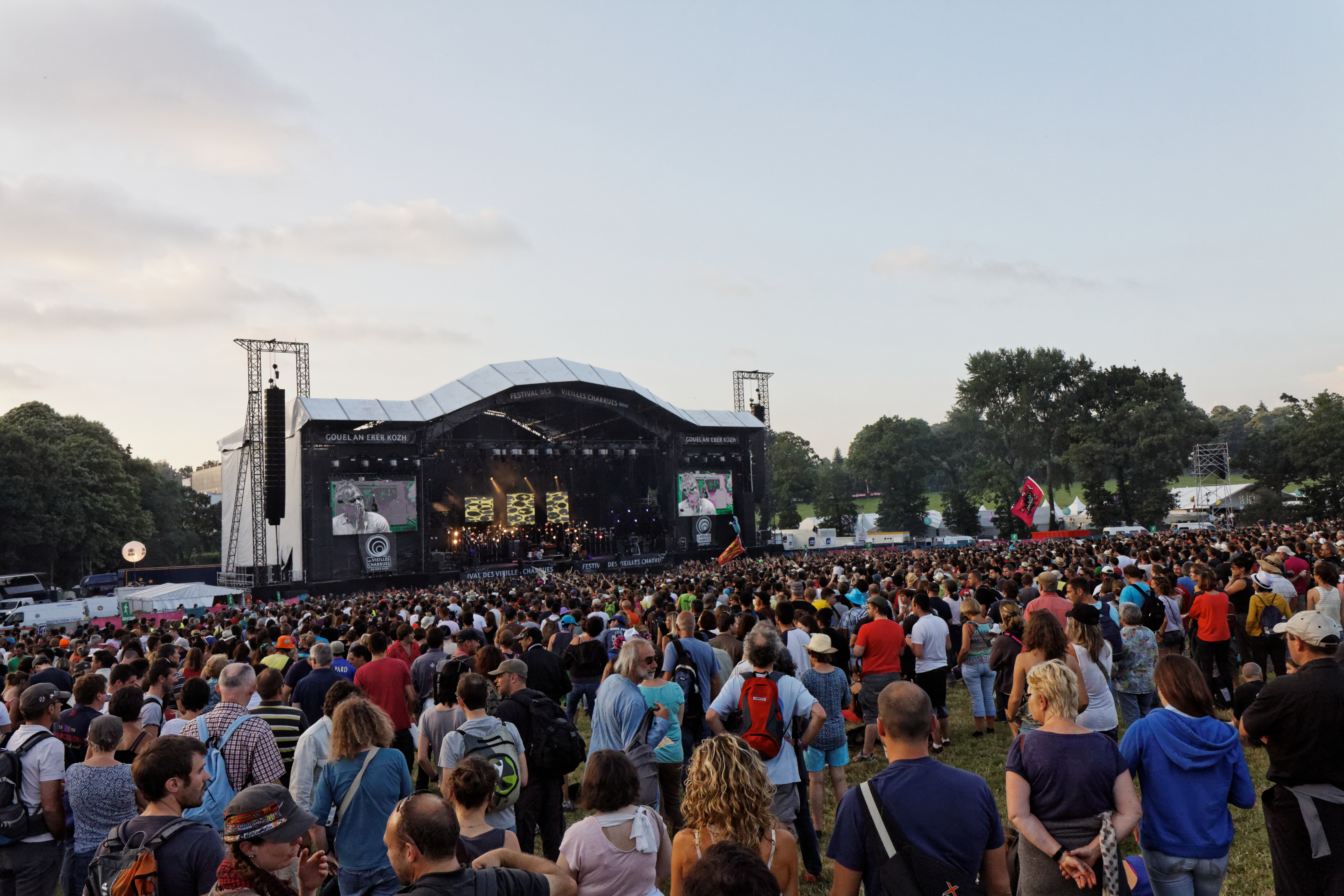 Le festival des Vieilles Charrues 2014.